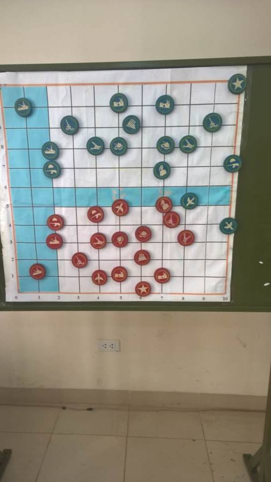 Командирские шахматы